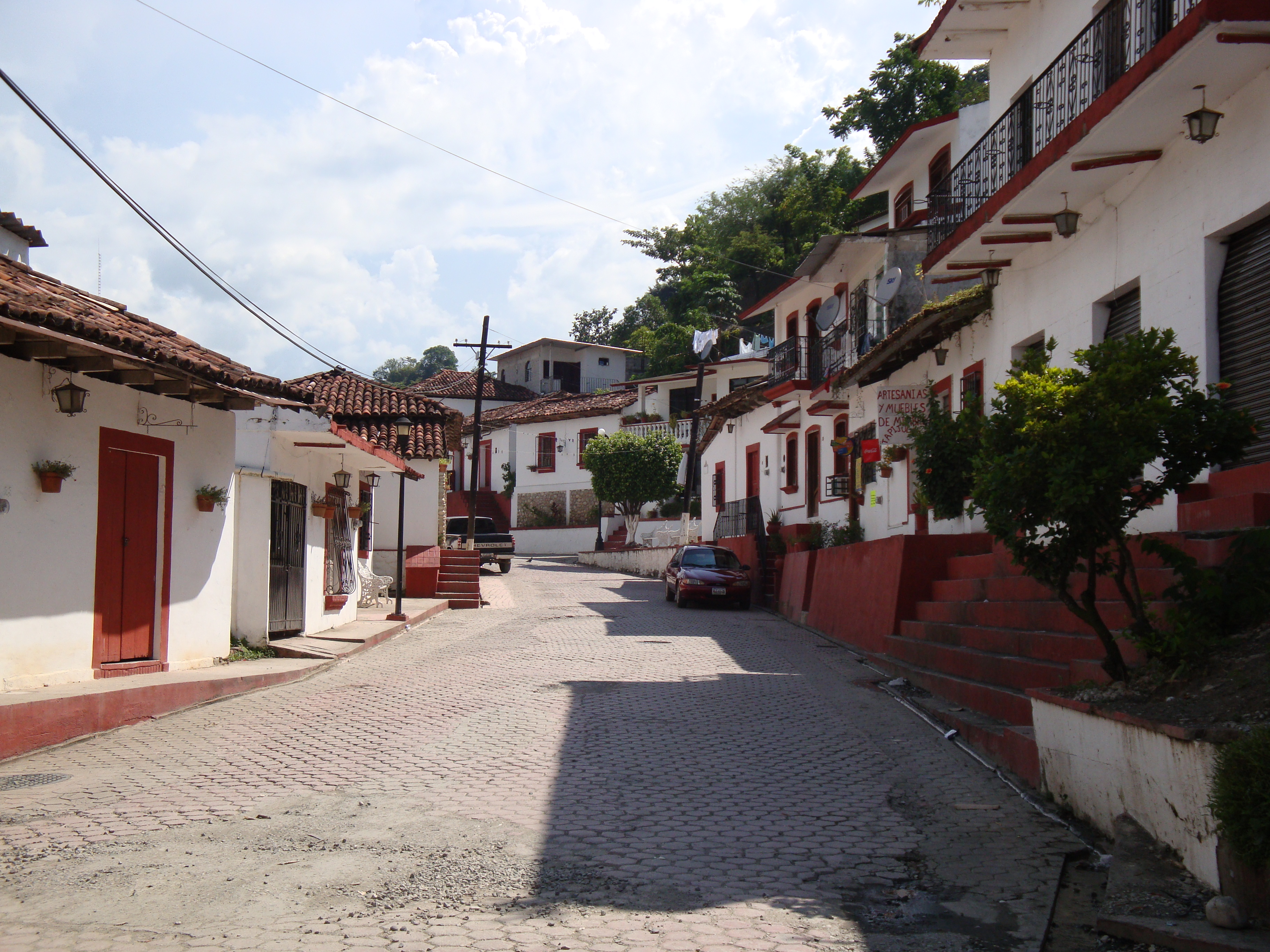 Calle de Tapijulapa, "Pueblo Magico", municipio de Tacotalpa, Tabasco.